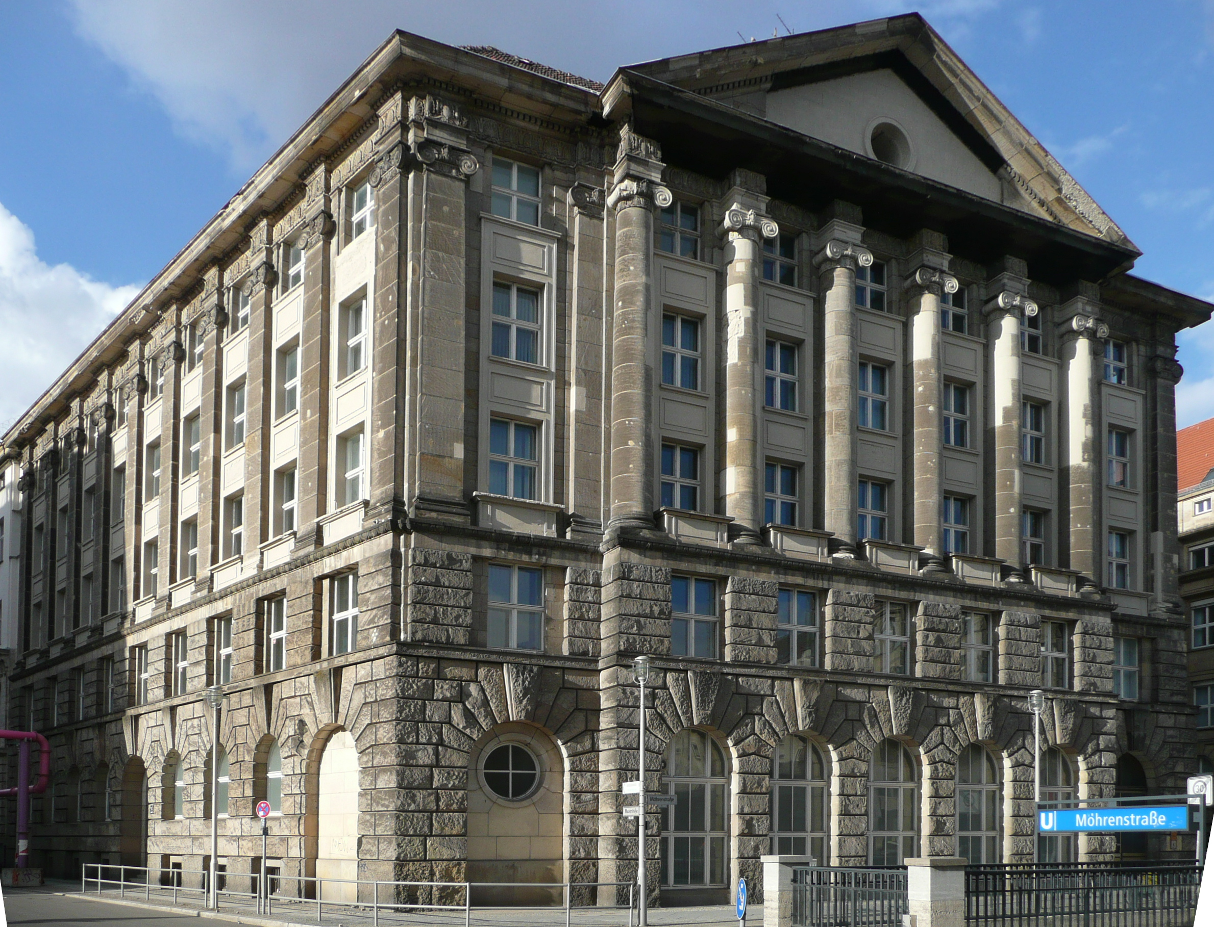 Allianzversicherung, Mohrenstr. 63, 1913-16 von Bodo EbhardtThis is a photograph of an architectural monument.